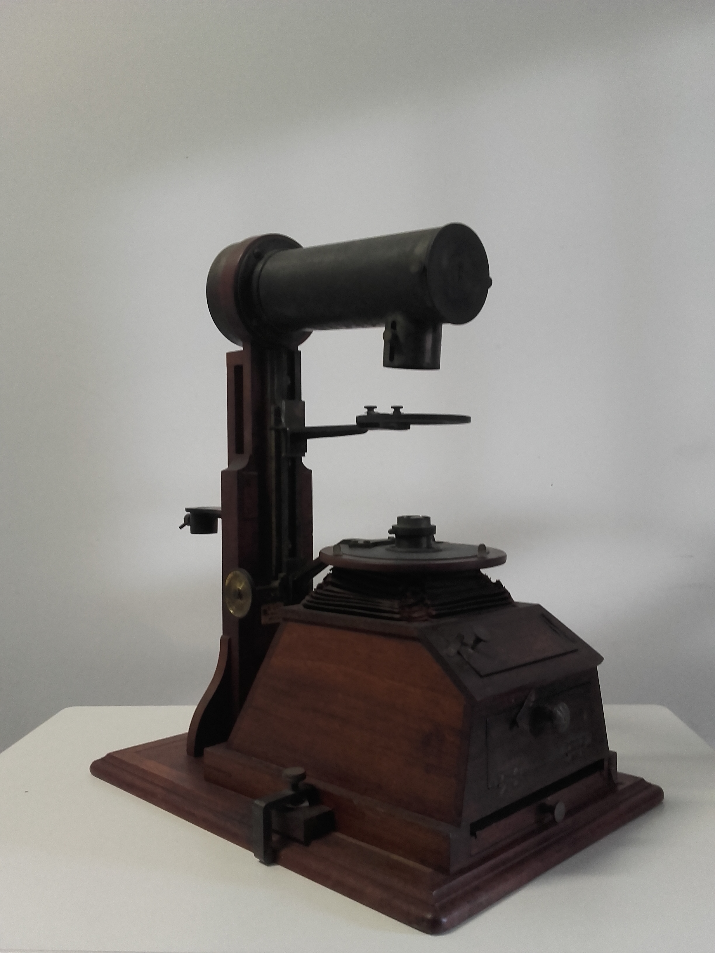 Il permet des microphotographies sur plaques 13 x 18 cm. Le bâti de l’appareil est en noyer ciré, le soufflet en peau. Le dispositif de réglage de netteté est réalisé par une crémaillère en laiton. La source de lumière est manquante. Fabriqué par la Maison Ernest Leitz